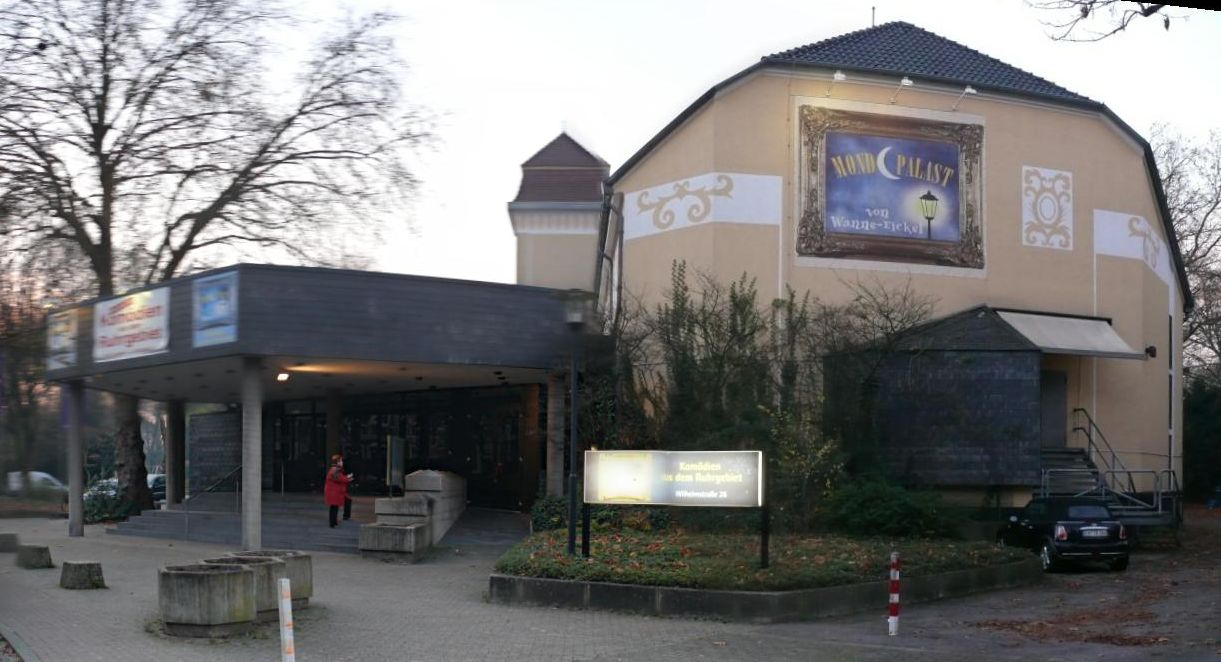 Mondpalast Herne, eigene Bilder mit Autostitch zusammengefügt